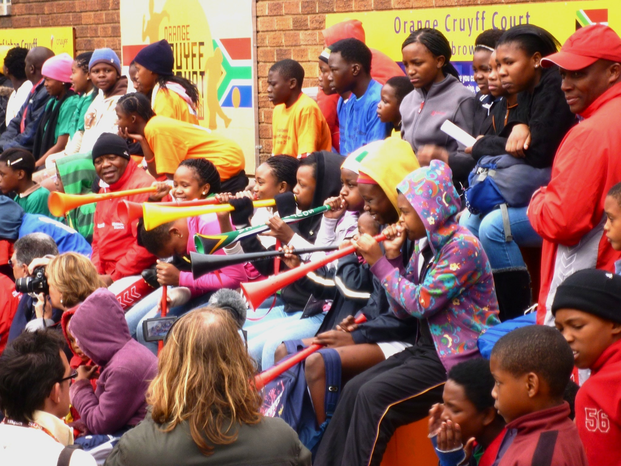 Vuvuzela op de tribune